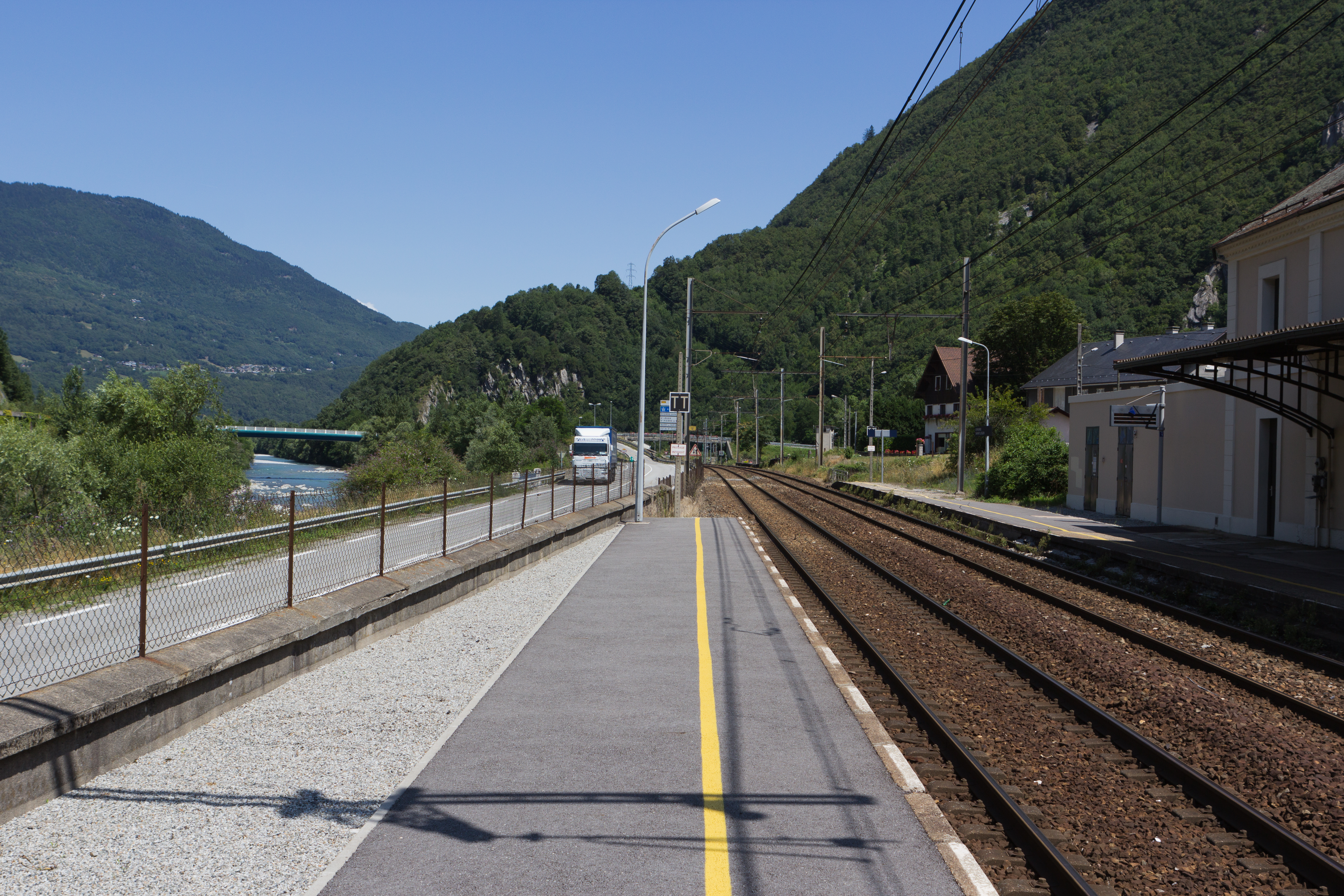 Gare d'Épierre-Saint-Léger, commune d'Épierre, département de la Savoie, France